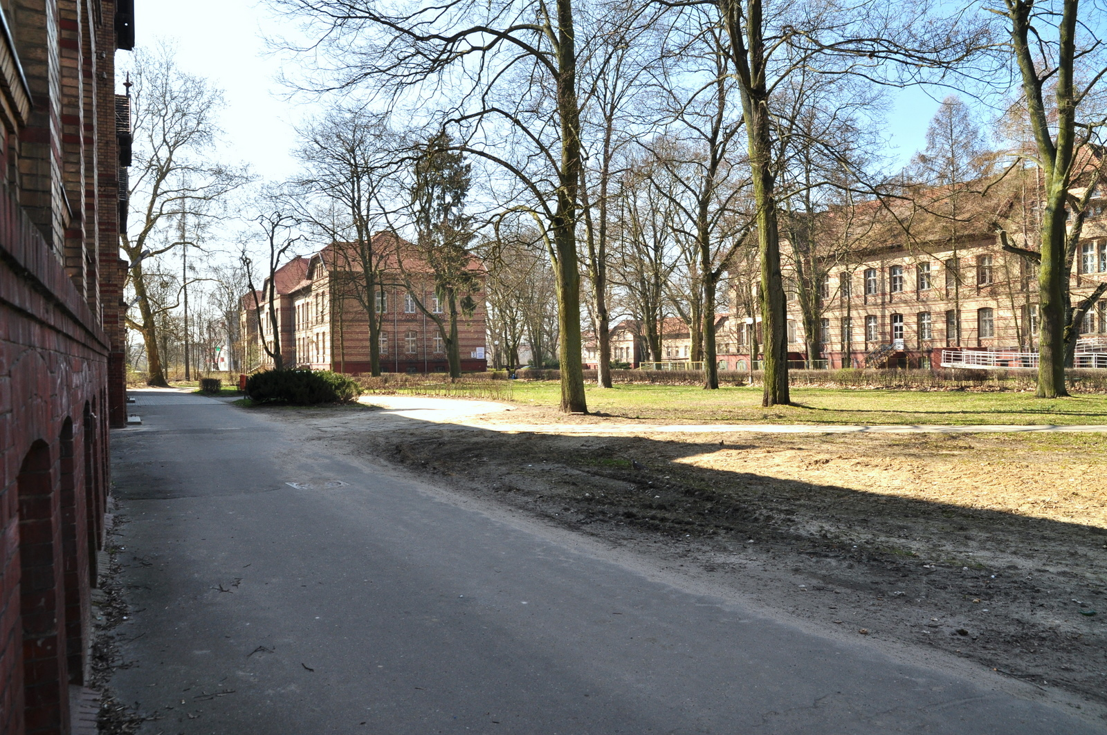 Gorzów Wielkopolski - dawny szpital psychiatryczny (obecnie Samodzielny Publiczny Szpital Wojewódzki)